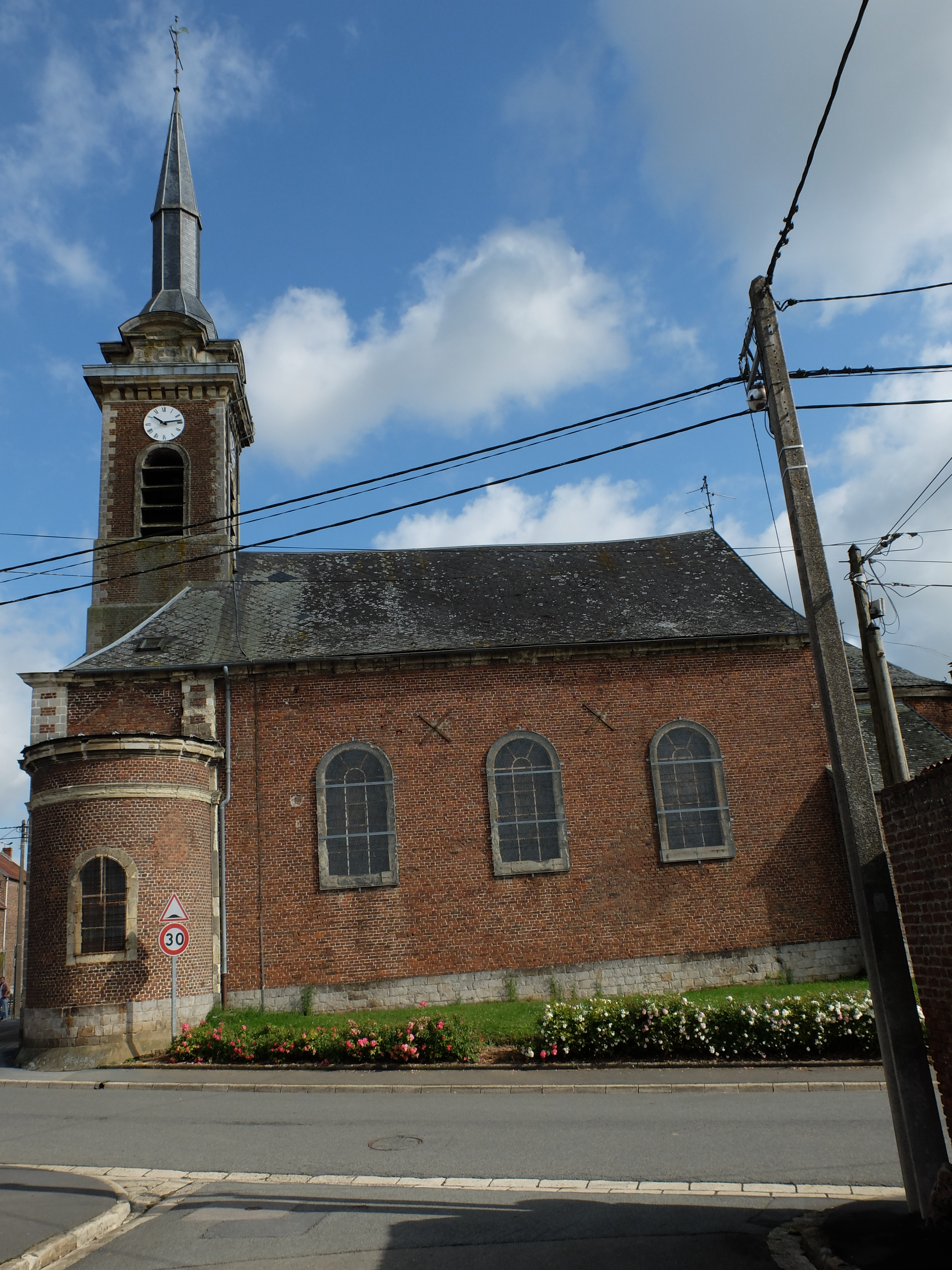 Vue de l'église Saint-Martin de Noyelles-sur-Selle.